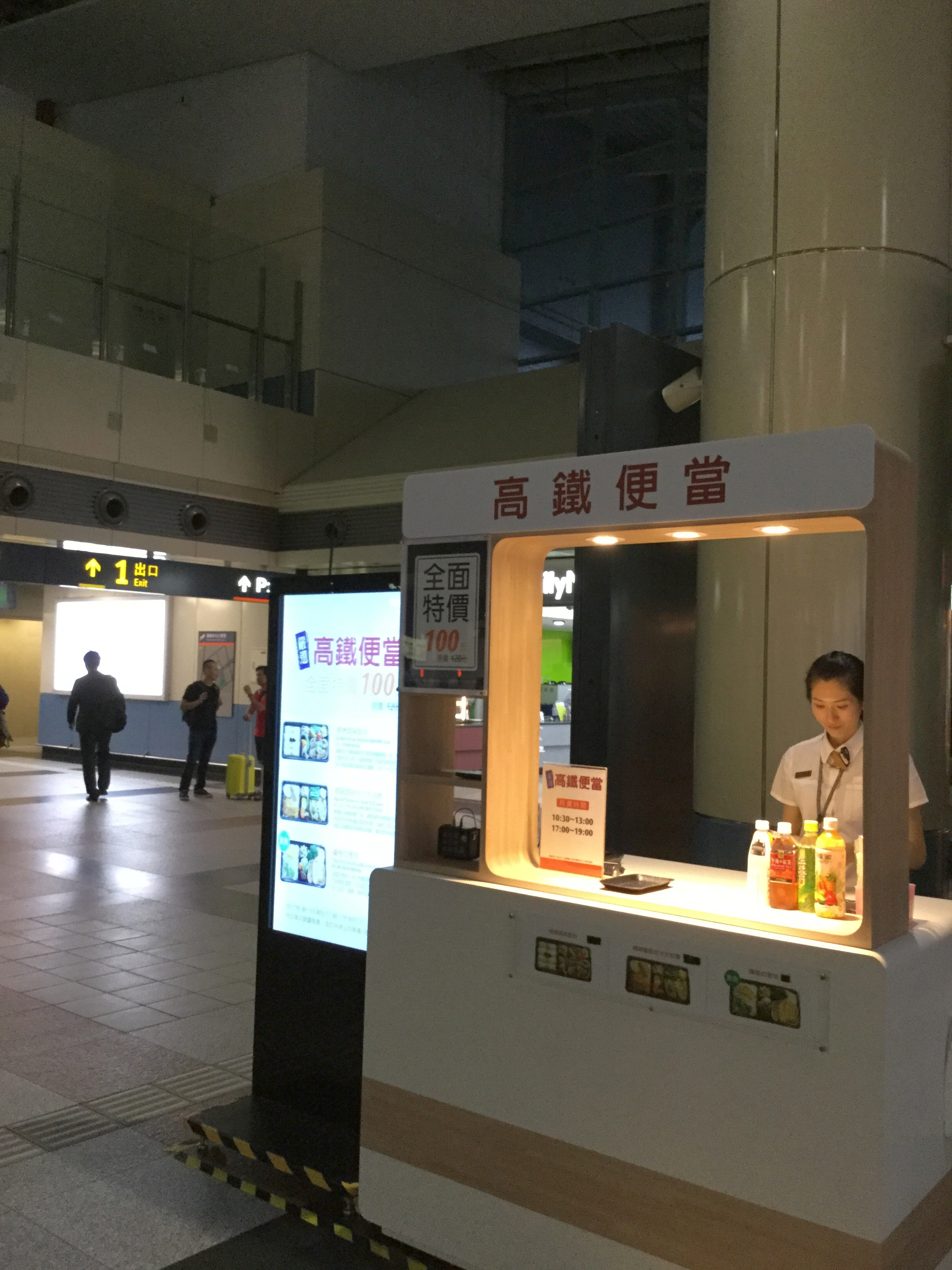 嘉義車站的高鐵便當